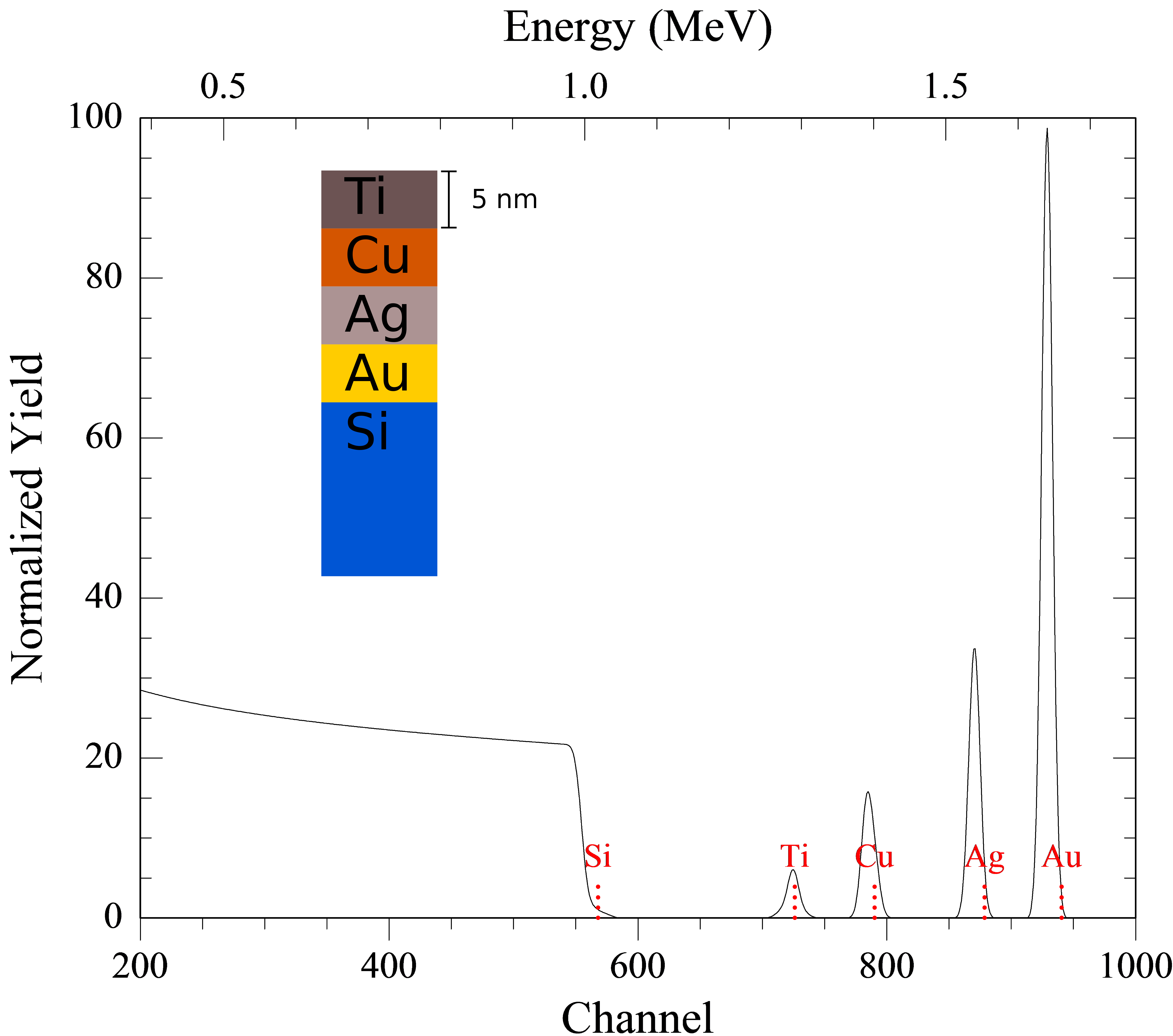 Simuliertes RBS-Spektrum eines Siliziumsubstrats mit jeweils 5nm dicken Schichten Titan, Kupfer, Silber und Gold, bestrahlt mit He+-Ionen der Energie 2,0MeV